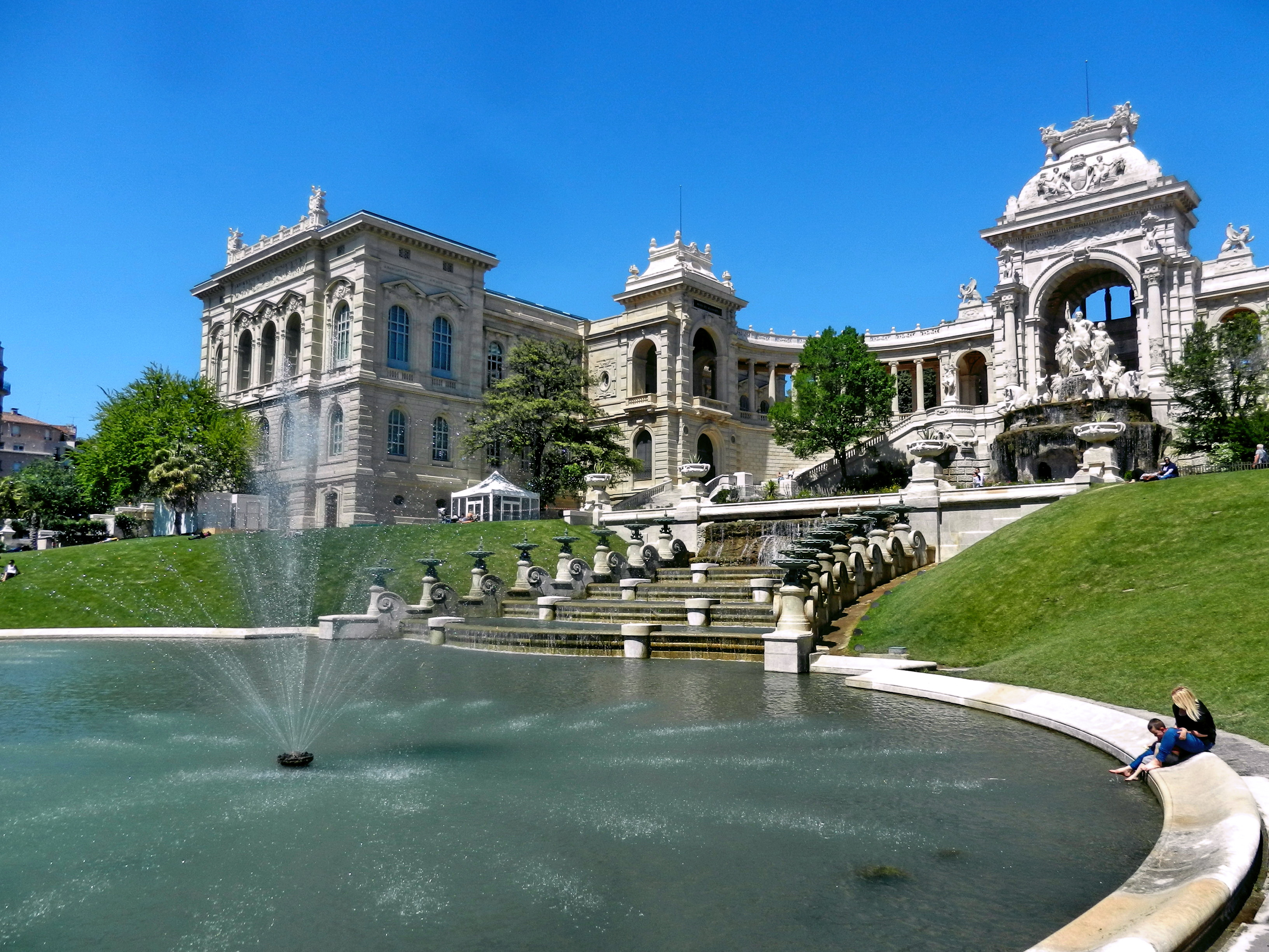 Марсель